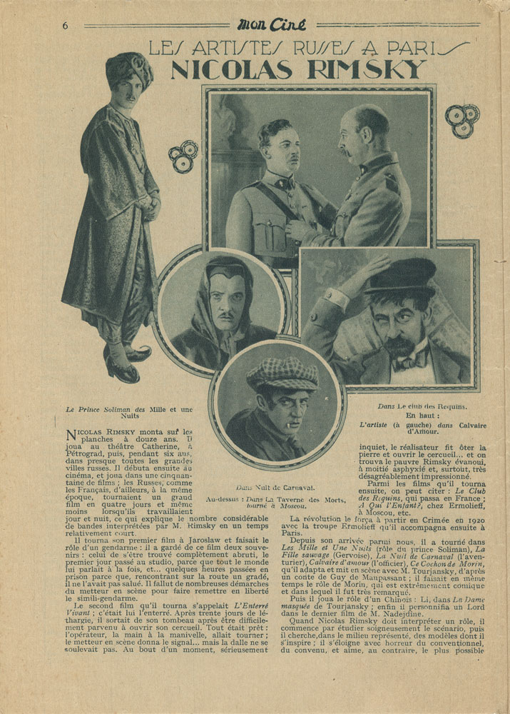 Статья во французском журнале о актере Николае Римском (Nicolas Rimsky)